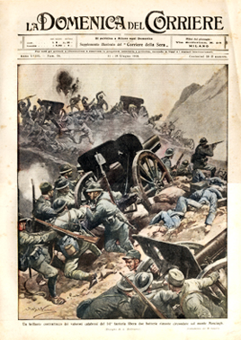 Un brillante contrattacco dei valorosi calabresi del 141° fanteria libera due batterie rimaste circondate sul monte Mosciagh.